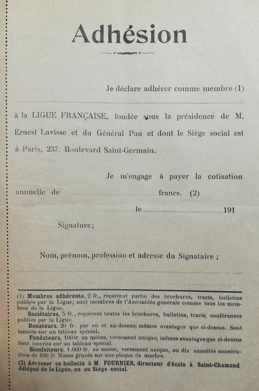 Ligue française, bulletin d'adhésion, section de Saint-Chamond, 1918